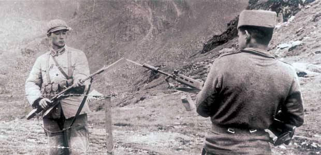 中国军士兵使用的56年式半自动步枪